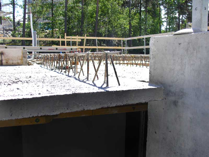 Plattbärlag